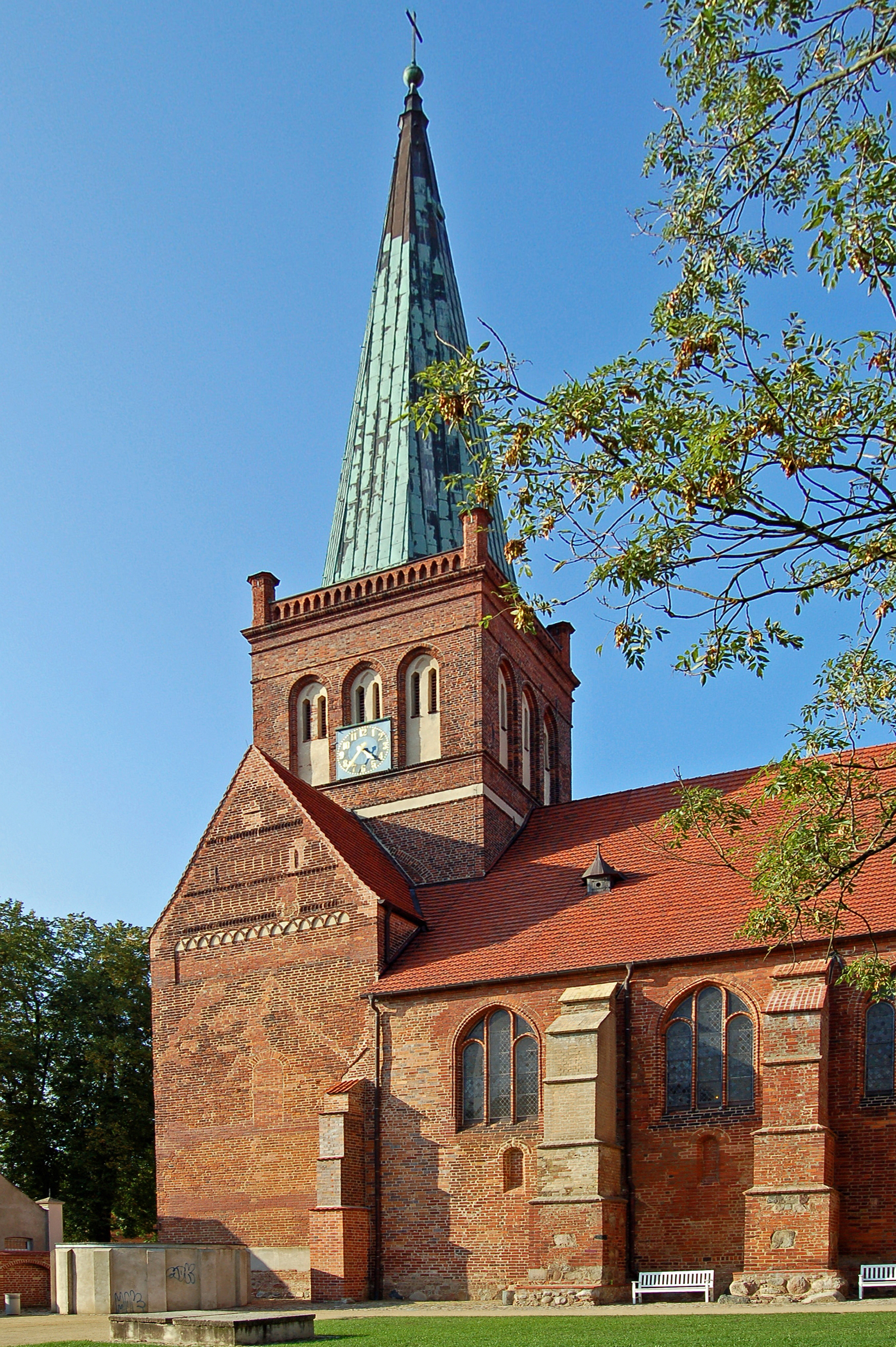 Die Kirche befindet sich rückseitig des Marktplatzes und umfasst auch Kirchhof und Klosterhofbereich. Sie wurde um 1180 unter Fürst Jaromar I. als eine romanische Basilika mit Querschiff erbaut. Im Jahr 1193 wurde sie zur Klosterkirche Bergen geweiht. Sankt Marien gehört zu den frühesten Backstein-Kirchenbauten im norddeutschen Raum und ist zudem das älteste Gebäude Rügens. Mit dem 67,4 m hohen und von überall her weithin sichtbaren Kirchturm ist sie ein markantes Wahrzeichen in der Silhouette der Stadt Bergen. Von 1896 bis 1903 wurde die Kirche letztmalig im größeren Stil restauriert und ergänzt. 2004 wurde die Basilika in die "Europäische Route der Backsteingotik" aufgenommen und 2005 in das Denkmalpflegeprogramm "National wertvolle Kulturdenkmäler".